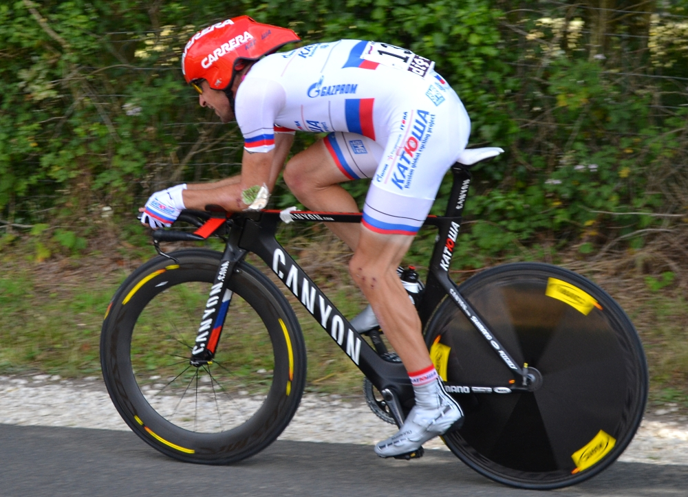 Denis Menchov TDF2012